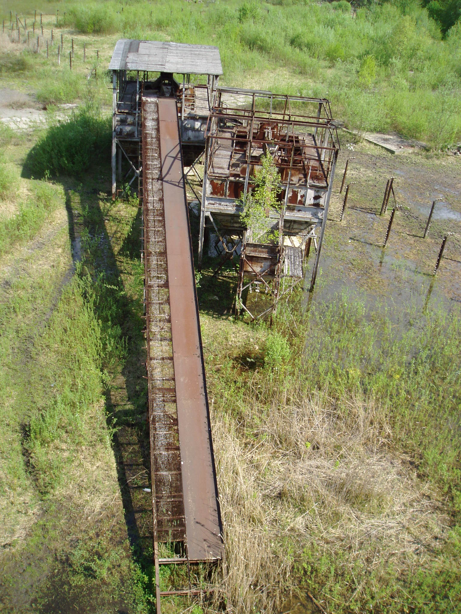 Elementi scenografici del film Schindler's list, non smantellati al tarmine delle riprese in Polonia